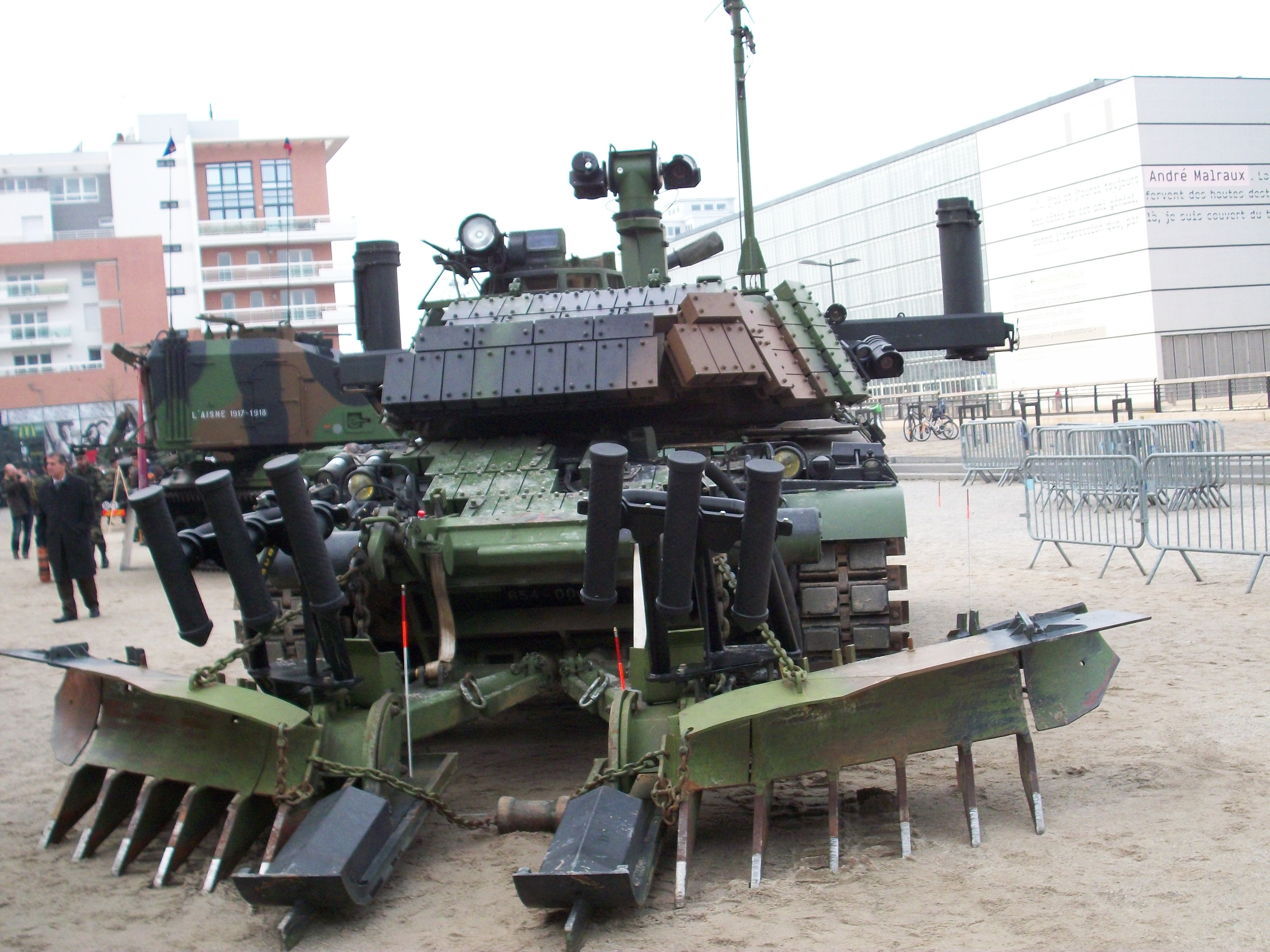 Présentation de véhicules de l'armée française devant Rivétoile, Strasbourg